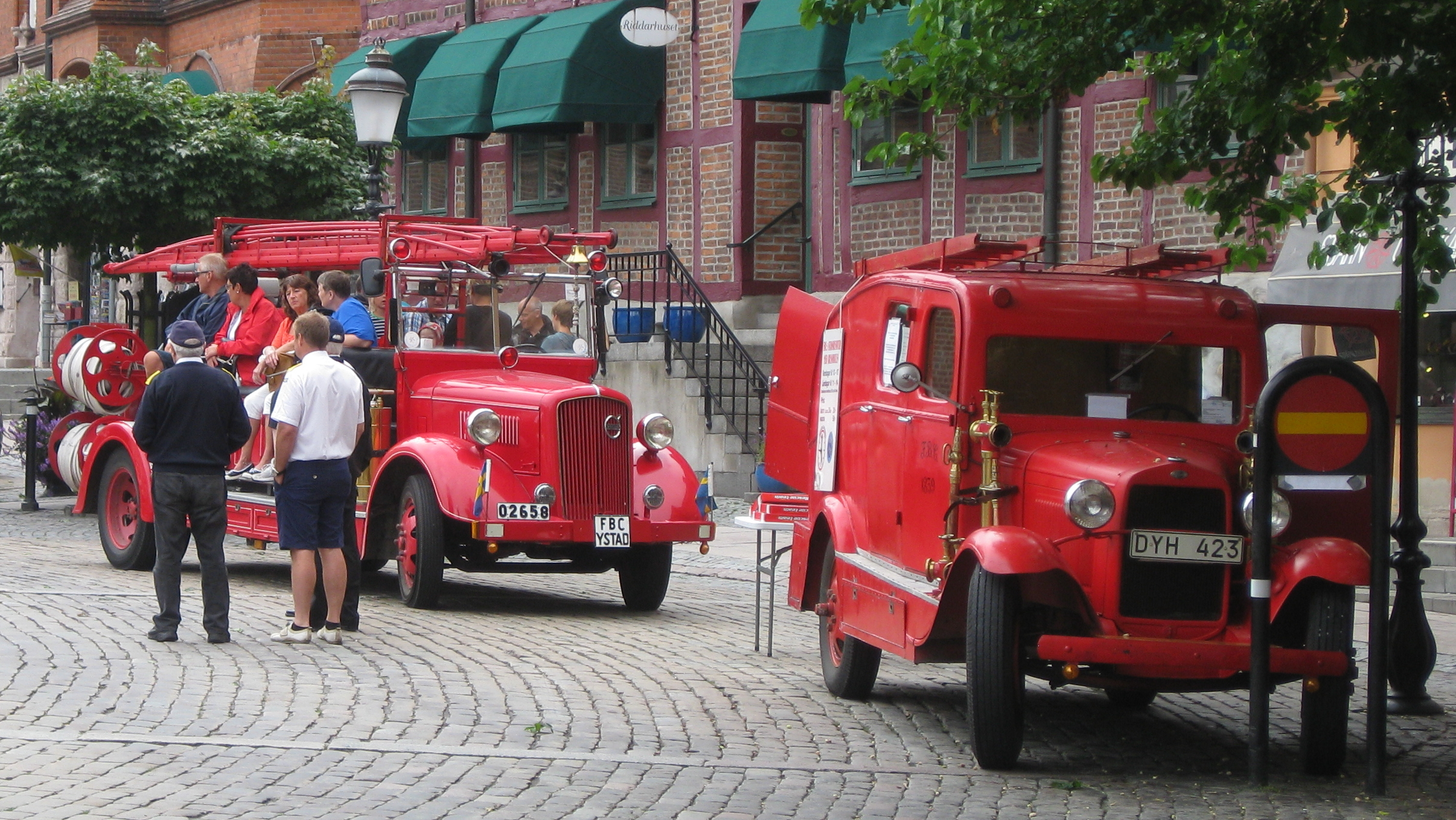 Ystads frivilliga brandkår, veteranbilar